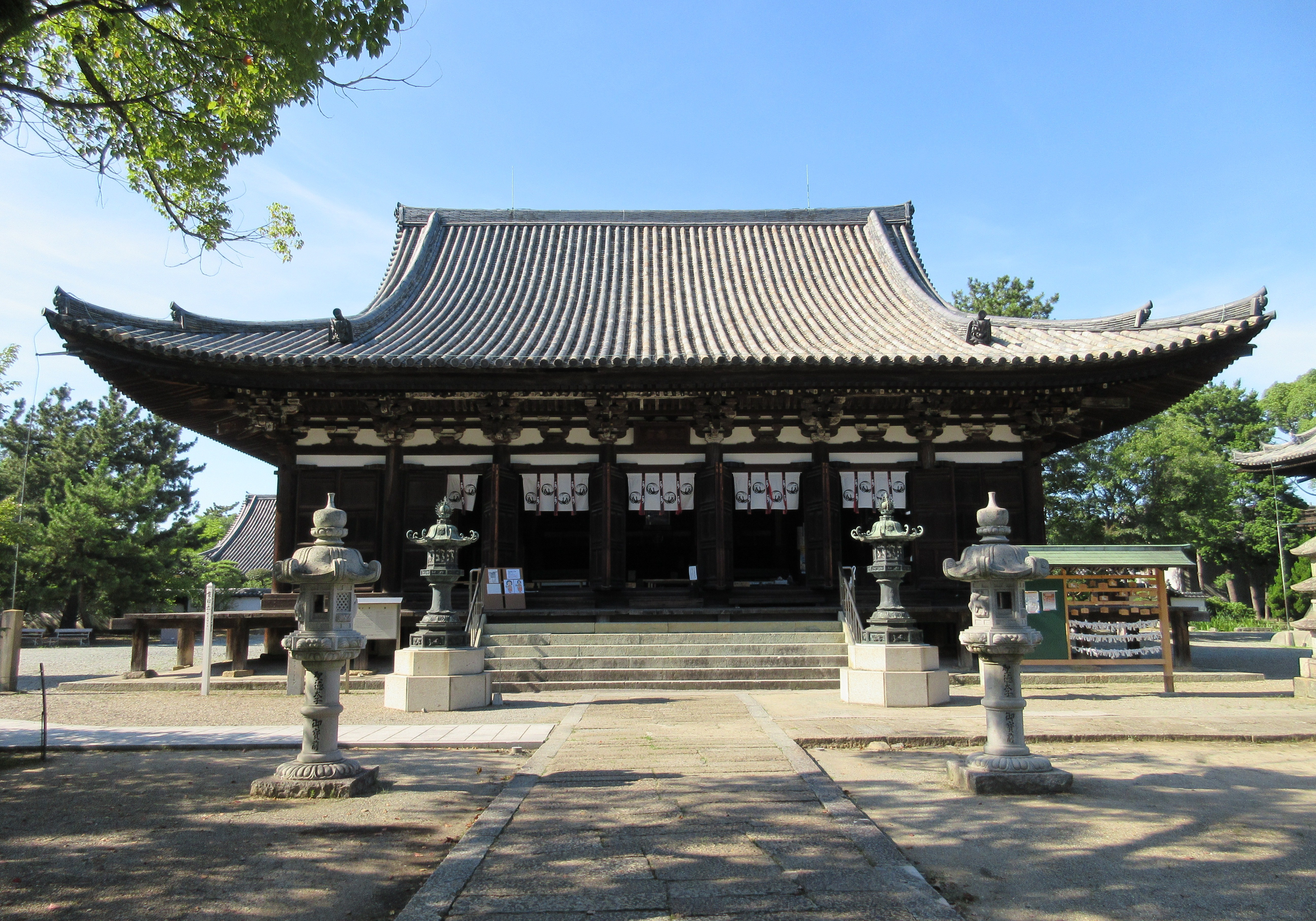 鶴林寺本堂